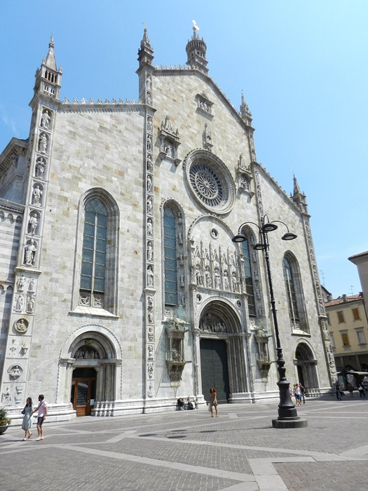 Como - Duomo